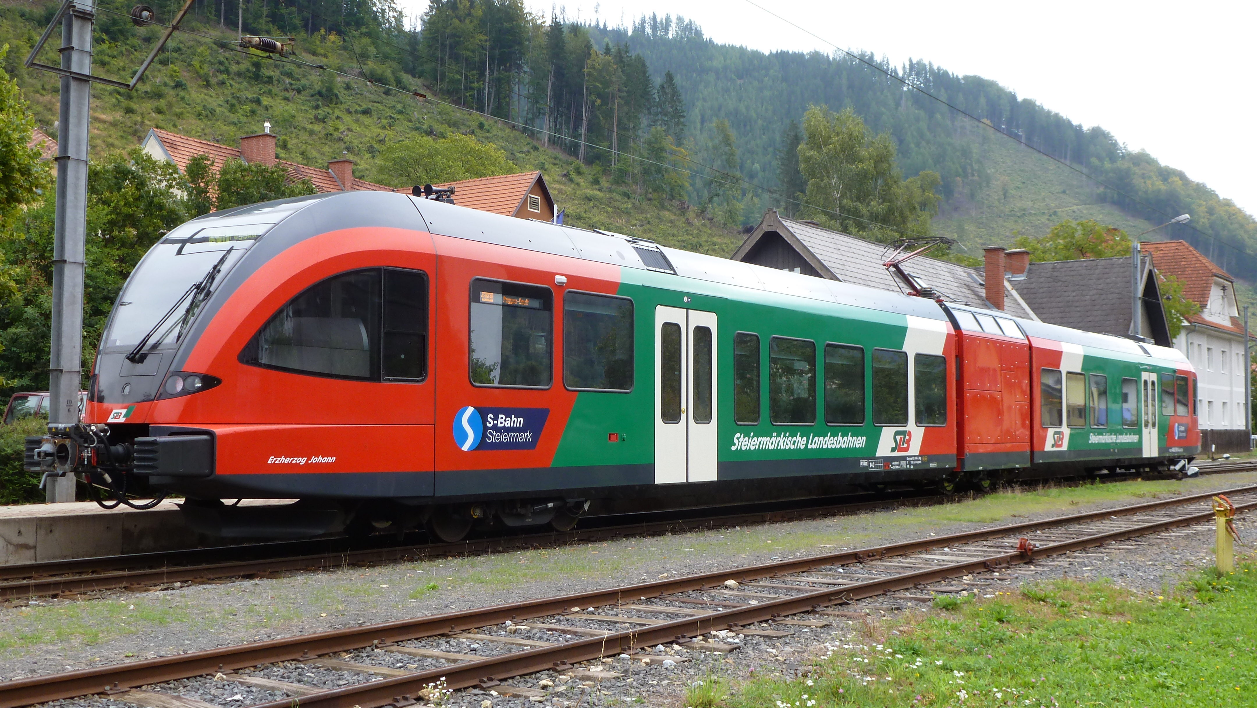 GTW 2/6 (elektrisch) 94 81 4062 001-4 der Steiermärkischen Landesbahn in Übelbach, 2011-09-16. Ab 2011 wird die Strecke Peggau - Übelbach mit diesen neuen Triebwagen betrieben.